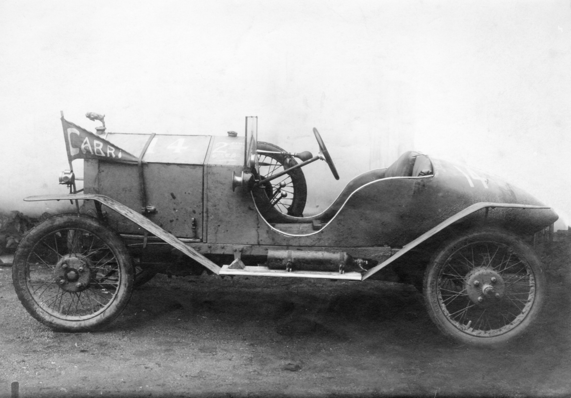 Voiture Le Cabri vue de coté